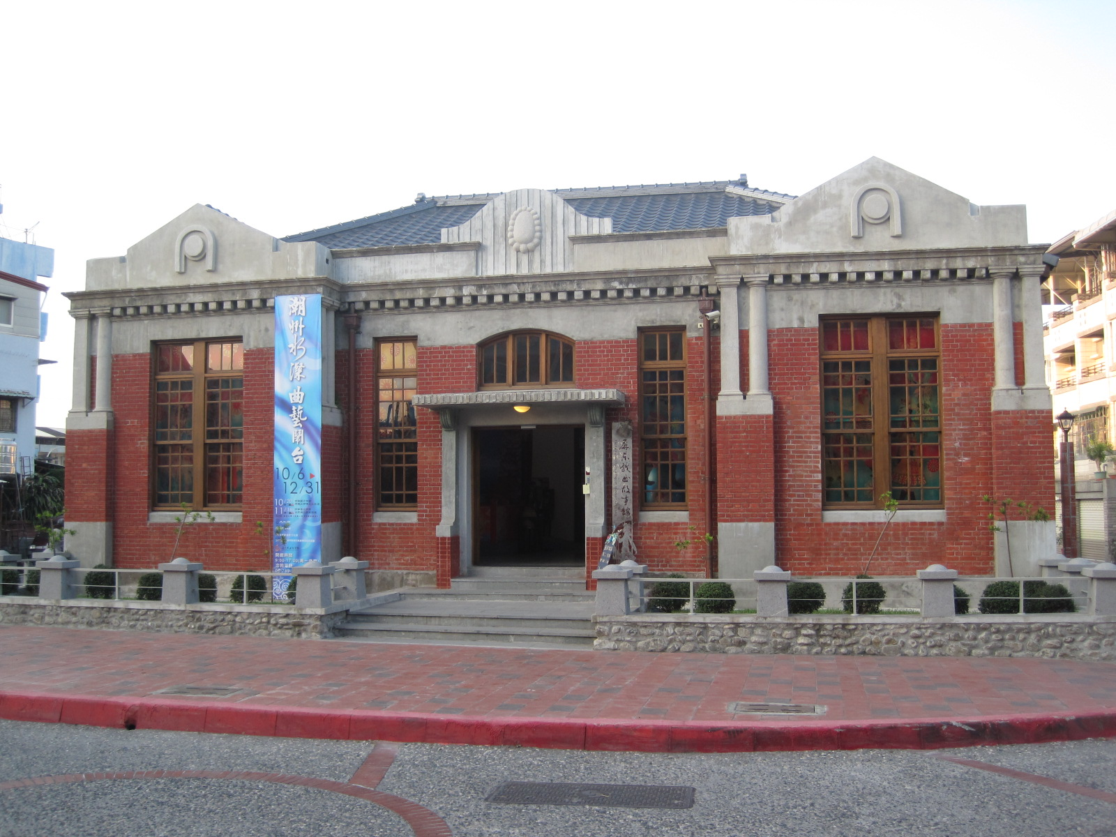 潮州庄役場，後升格為街役場。後來曾作為郵局使用，拍攝時已修復並作為屏東戲曲故事館。